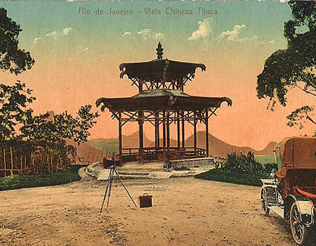 Vista Chinesa, Rio de Janeiro, em cartão postal datado de 1911.